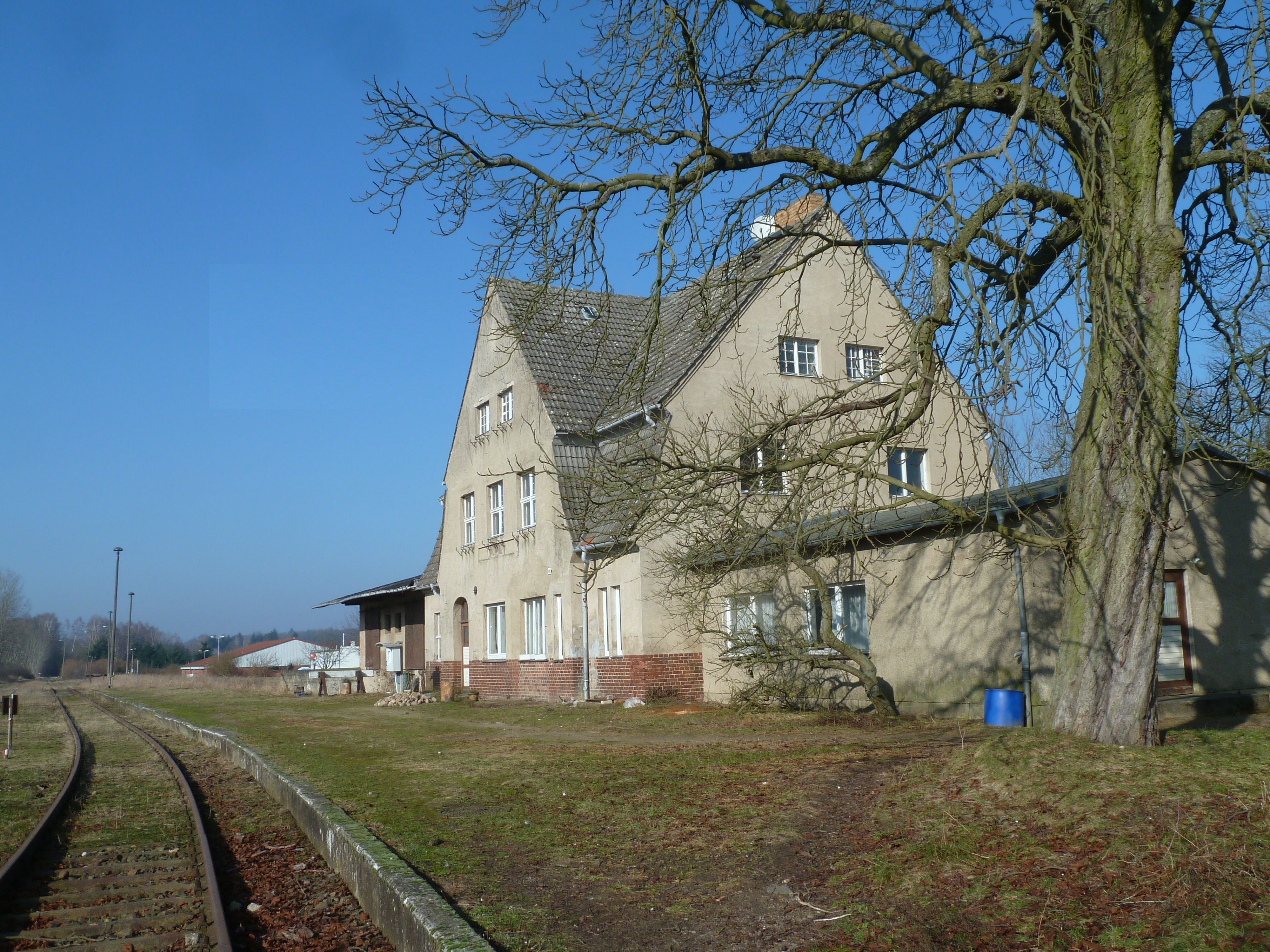 Bahnhof Feldberg (Meckl), , denkmalgeschütztes Empfangsgebäude Blick von Süden